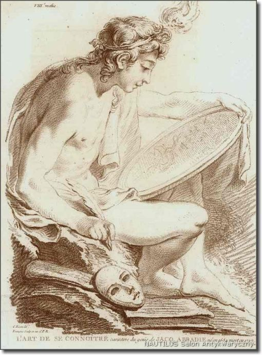 Personifikacja Samopoznania według Charlesa Eisena, 1760 Sposób kredkowy; wym.: 305 x 222 mm; sygn. pł. l.d.: C. Eisen del., Francois sculp. Et ex. CPR. Grafika wystawiana. Lit.: Katalog Hogarth i jego wiek, Kraków 2001, s. 94, il. 26.